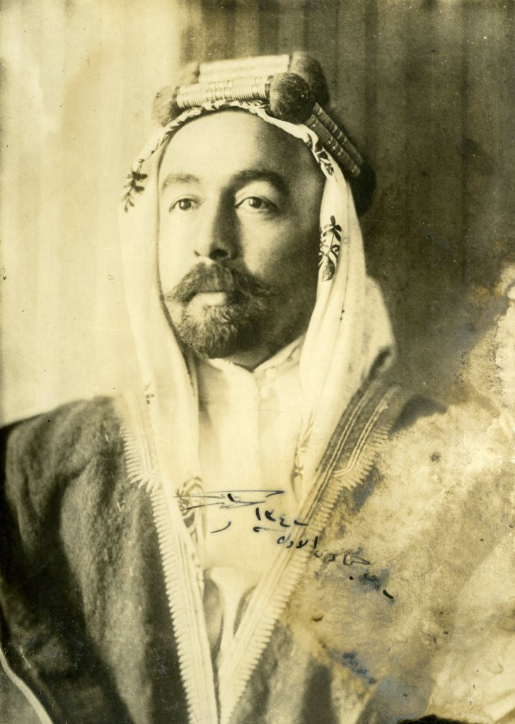 האמיר עבדאללה, צילום מוגדל של מלך ירדן עם חתימה שלו.